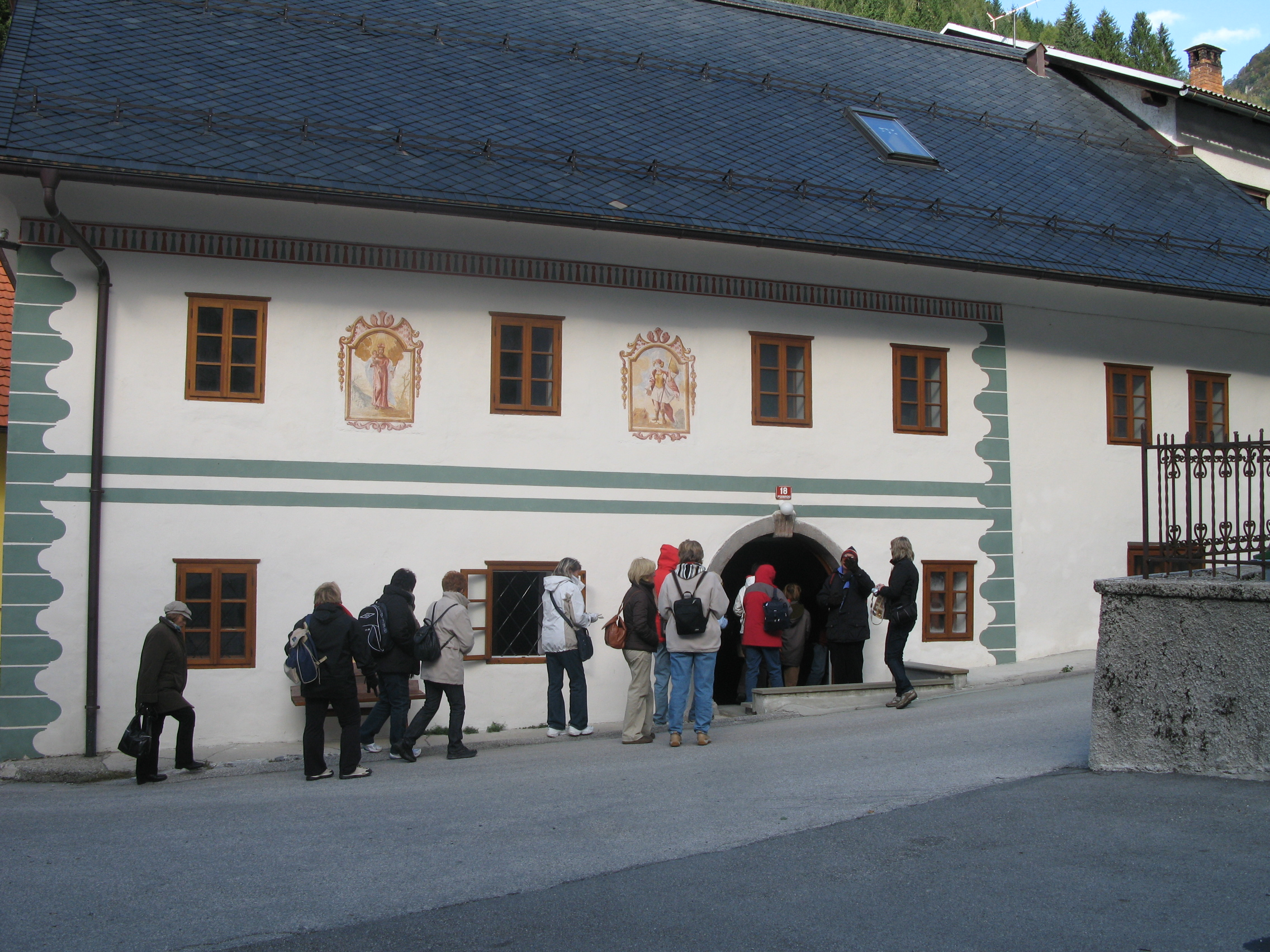 Jakovkna hiša v Podbrdu.